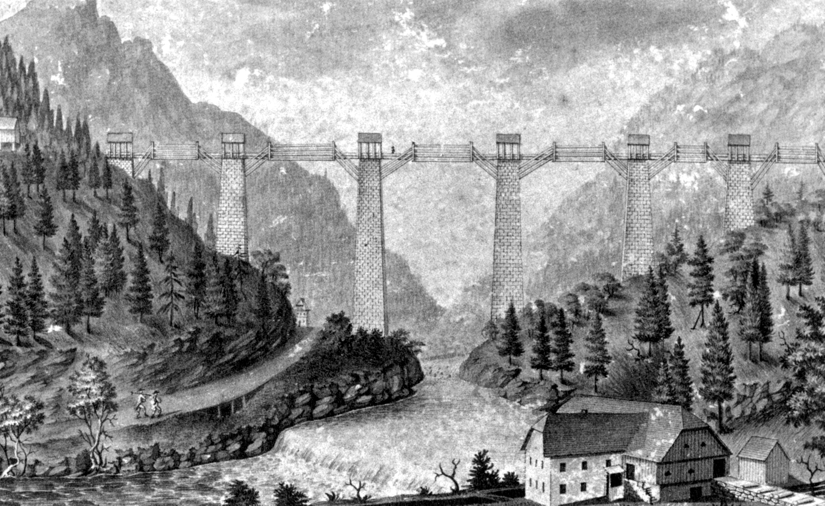 Zeichnung des Gosauzwanges, einer Soleleitungsbrücke zwischen Hallstatt und Ebensee